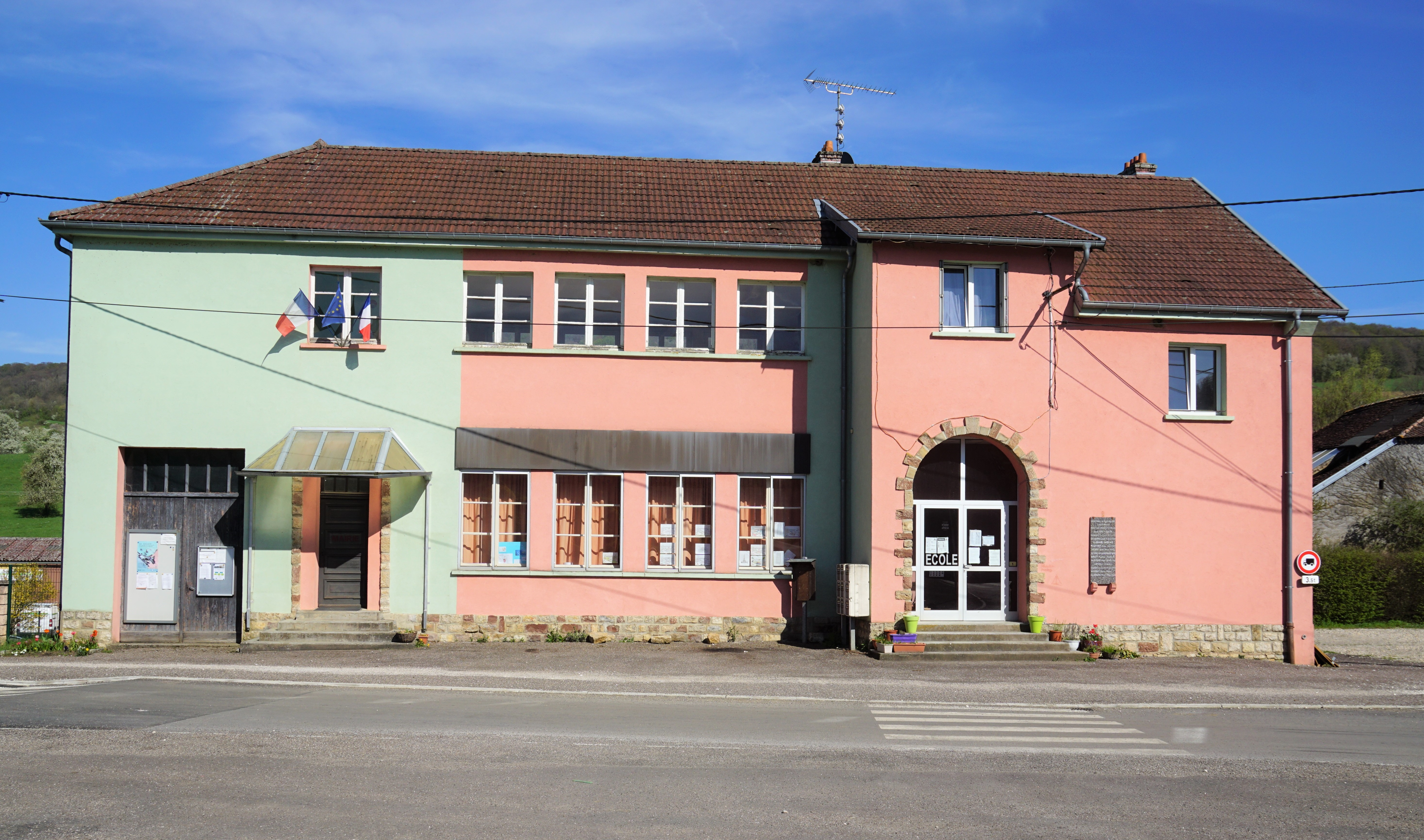 La mairie-école de Gémonval, Doubs, France.